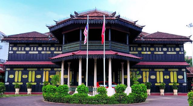 Istana Jahar